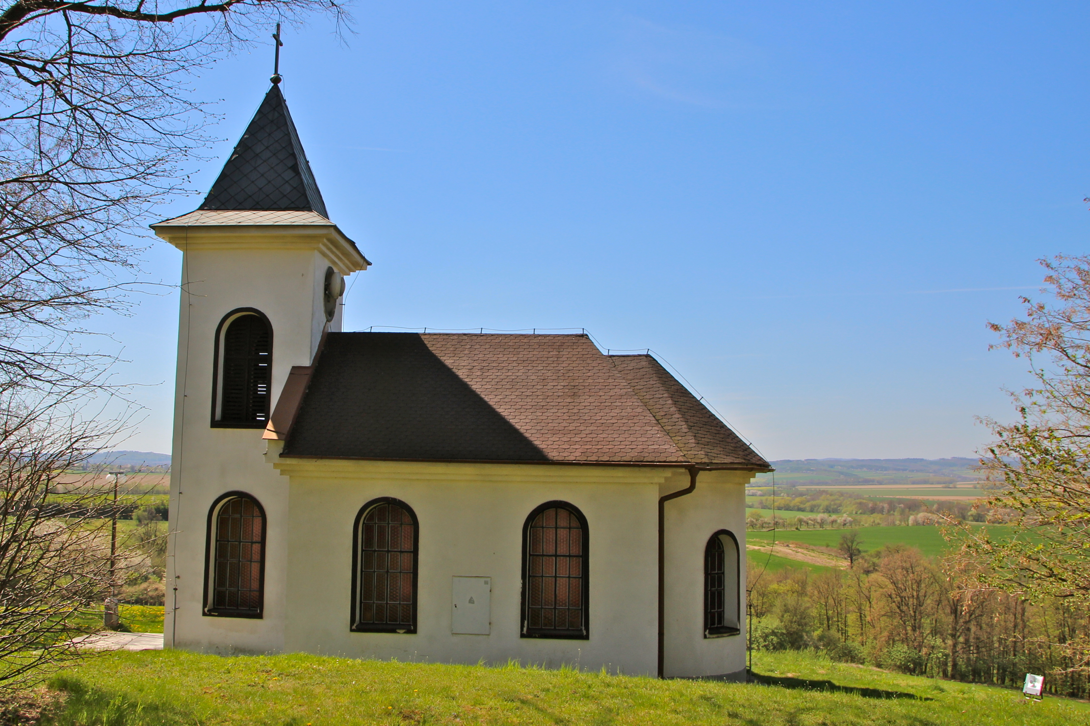 Rusín – wieś w Czechach, w powiecie Bruntál, w kraju morawsko-śląskim.